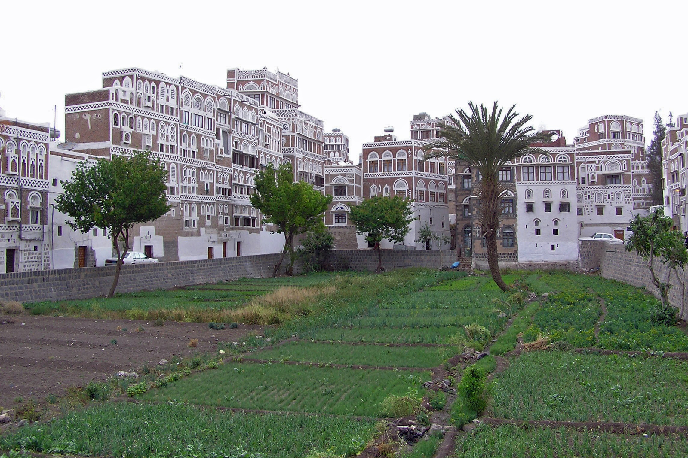 Potager au centre de la vieille ville de Sana'a - Yémen